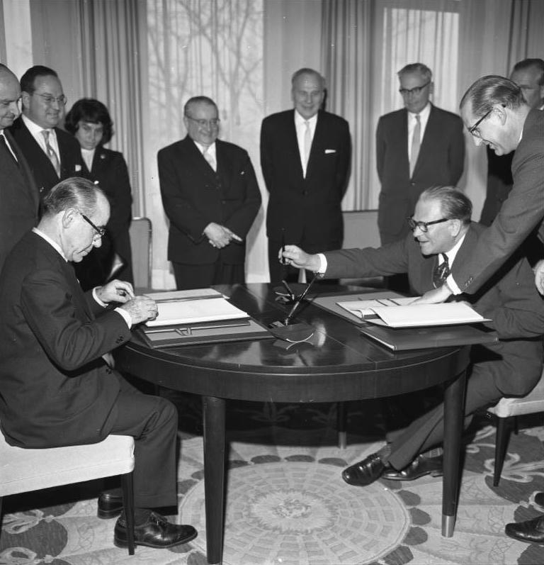 Unterzeichung des deutsch-spanischen Akommens über die Wanderung, Anwerbung und Vermittlung von spanischen Arbeitnehmern nach der Bundesrepublik Deutschland durch den spanischen Botschafter Marqués de Bolarque und Staatssekretär van Scherpenberg am 29. März 1960 im Auswärtigen Amt Unterzeichner: Botschafter Marqués de Bolarque und Staatssekretär van Scherpenberg rechts vorne: VLR Hoffmann im Hintergrund: Herr Sorribes, eine Dolmetscherin, Ministerialdirektor Dr. Janz, Ministerialdirigent Ehmke, LR I Schmiedt, von Braun (halb verdeckt)